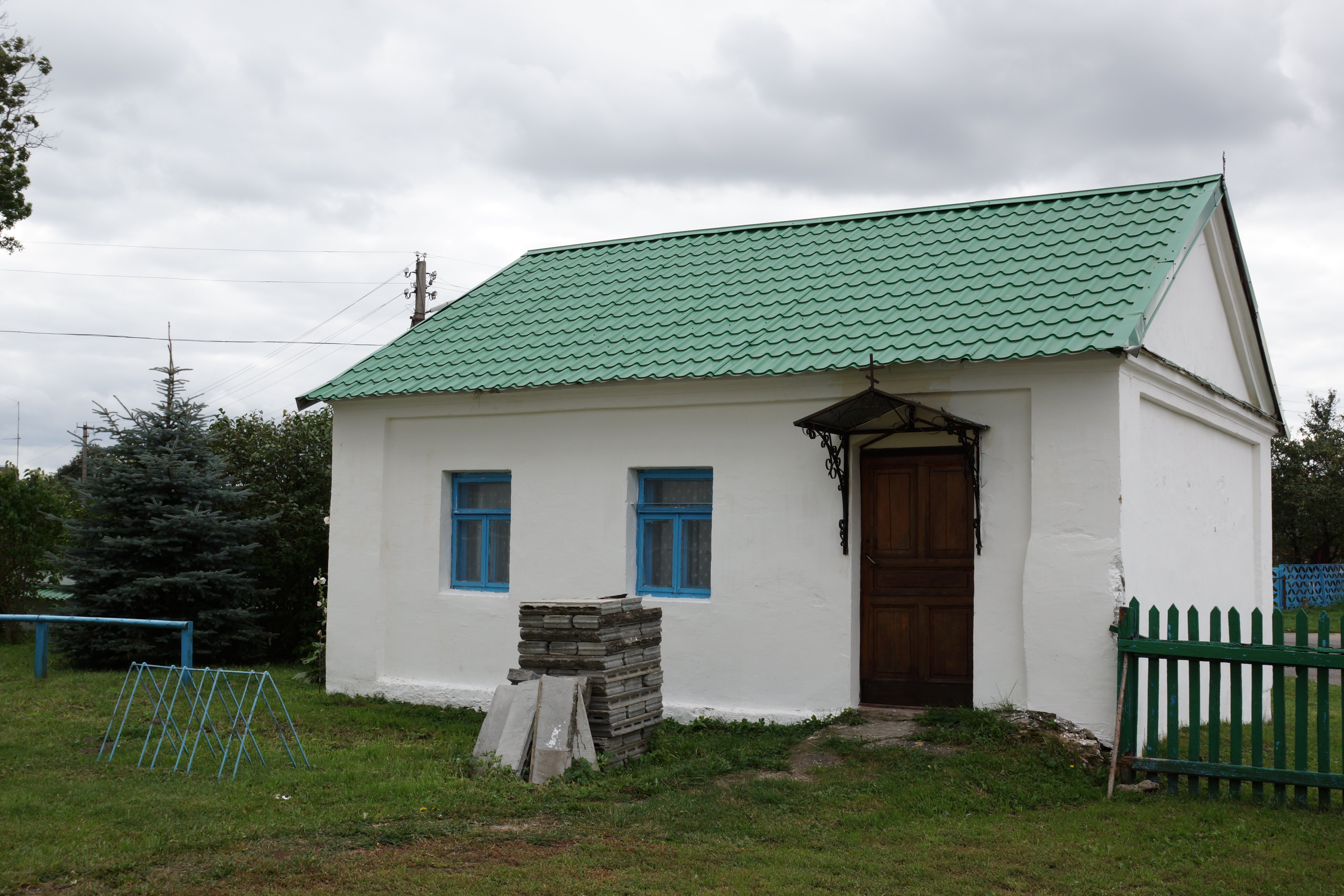 Беларуская (тарашкевіца): Дзьмітрыеўская царква з брамай і домам старасты. в. Шчорсы This is a photo of Belarusian heritage monument. Reference number: 412Г000468 ( WLM)